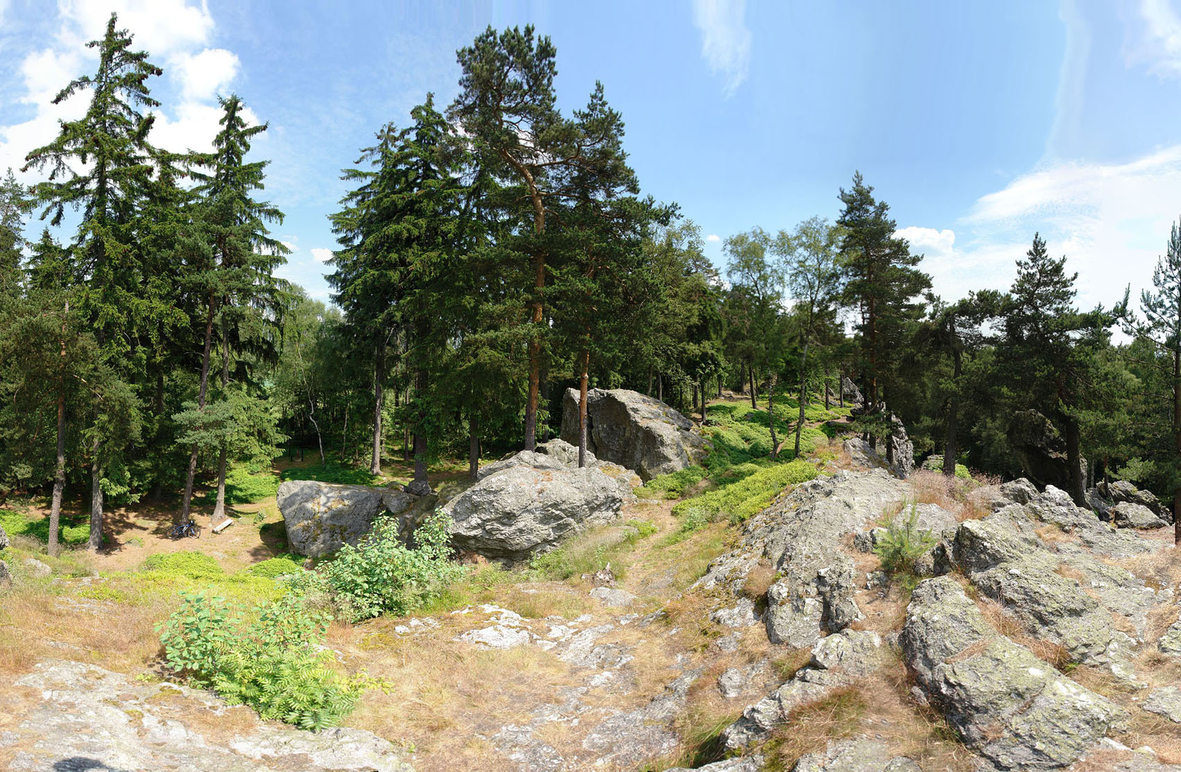 Přírodní památka Goethova Skalka, okr. Cheb